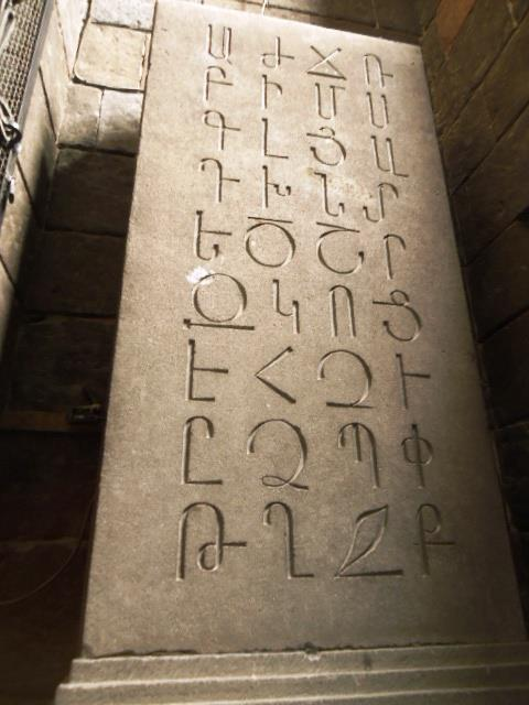 THE ARMENIAN ALPHABET, OSHAKAN, ARMENIA